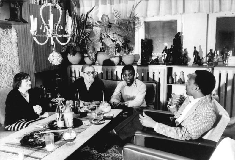 Rostock, Auszubildende aus Mosambik, Freizeit ADN-VB-Sindermann 18.4.1984 Aus der Betriebsschule des VEB Fischfang Rostock erhalten gegenwärtig 19 junge Mosambiquer eine mehrjährige Fachausbildung in verschiedenen Berufen der Hochseefischerei. Als künftiege Vollmatrosen und spätere Schiffsführer lernen Armando Rodrigues (links) und Tomas Curado (rechts) schon jetzt die Küste von Mocambique auf der Seekarte kennen. Der Fachlehrer für Nautik Host Schwarz (rechts) unterrichtet die jungen Mocambiquaner in theoretischen, seemännischen und fischereispezifischen Fächern. (Hierzu gehören die Fotos 1984-0428-300N-303N!) Zum Beitrag: Von 19, die auszogen Fischerei zu lernen-Berufsausbildung junger Mocambiquaner in Rostock ADN-ZB Sindermann-18.4.1984 An der Betriebsschule des VEB Fischfang Rostock erhalten gegenwärtig 19 junge Mocambiquaner eine mehrjährige Fachausbildung in verschiedenen Berufen für die Hochseefischerei. Gern sind die jungen Männer bei der Familie des Rostocker Bildhauers Wolfgang Eckardt zu Gast, der im vergangenen Jahr mehrere Wochen in Mocambique weilte. Der Künstler hat sein Atolier unmittelbar an den Kaie des Rostocker Fischfangbetrieben. Hier sind in der Wohnung des Bildhauers Joquin Tembe (rechts ) und Miguel Timane zu Besuch. (Hierzu gehören die Fotos 1984-0418-300N-303N)